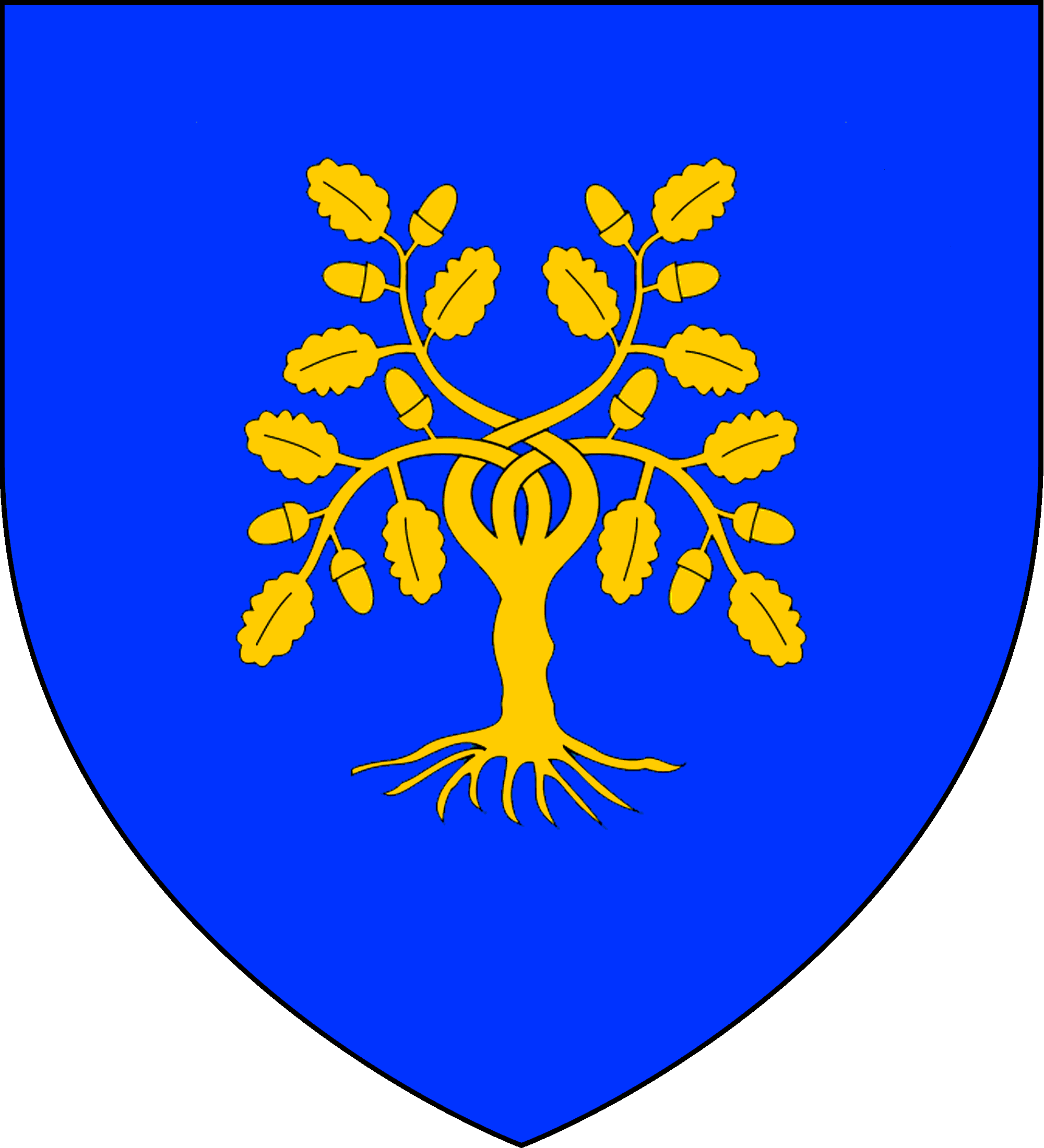 Blasón de la Casa Della Rovere